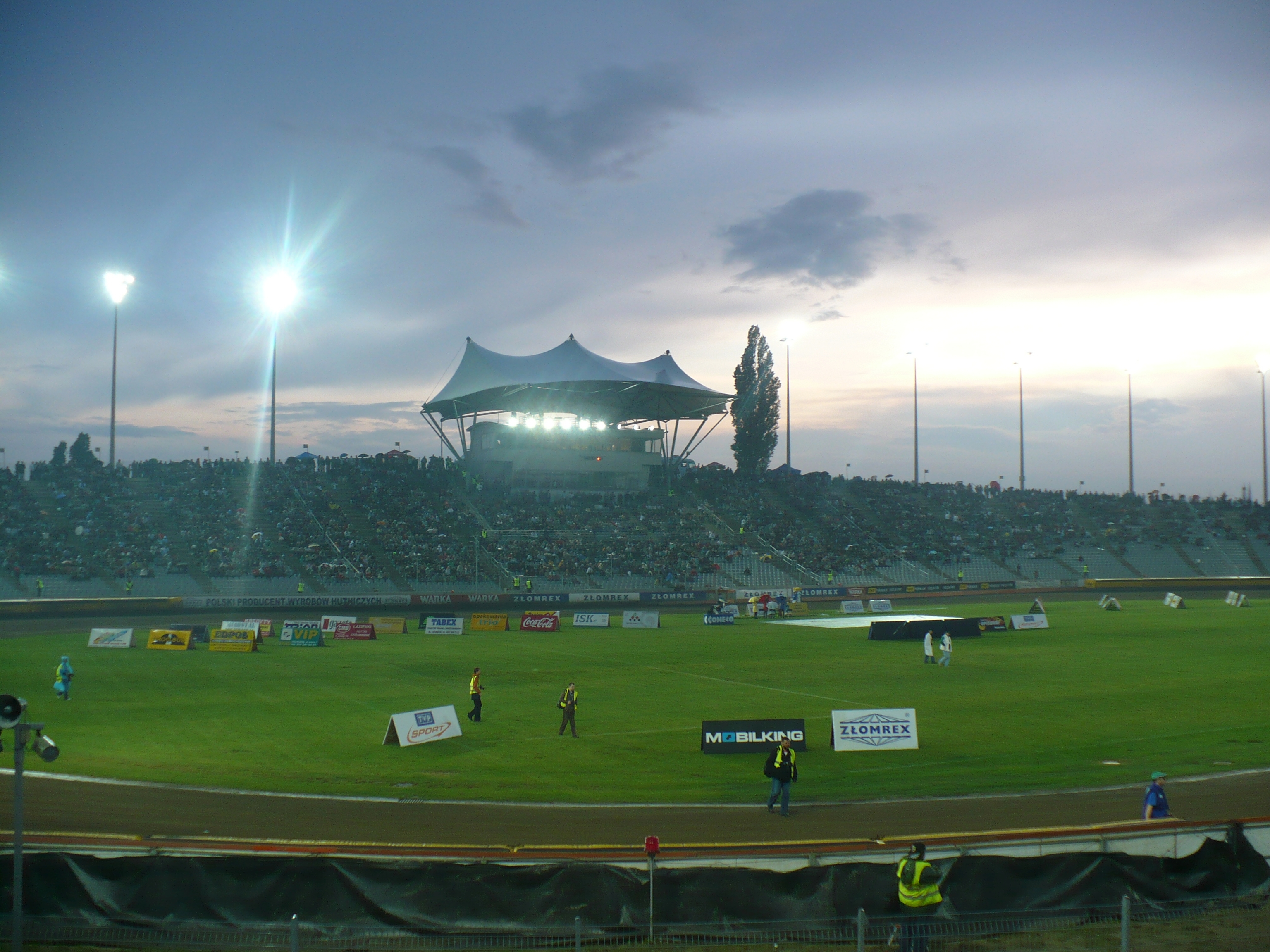 Trybuna centralna i nowa wieża sędziowska na Arenie Częstochowa podczas meczu Włókniarza Częstochowa i ZKŻ Zielona Góra